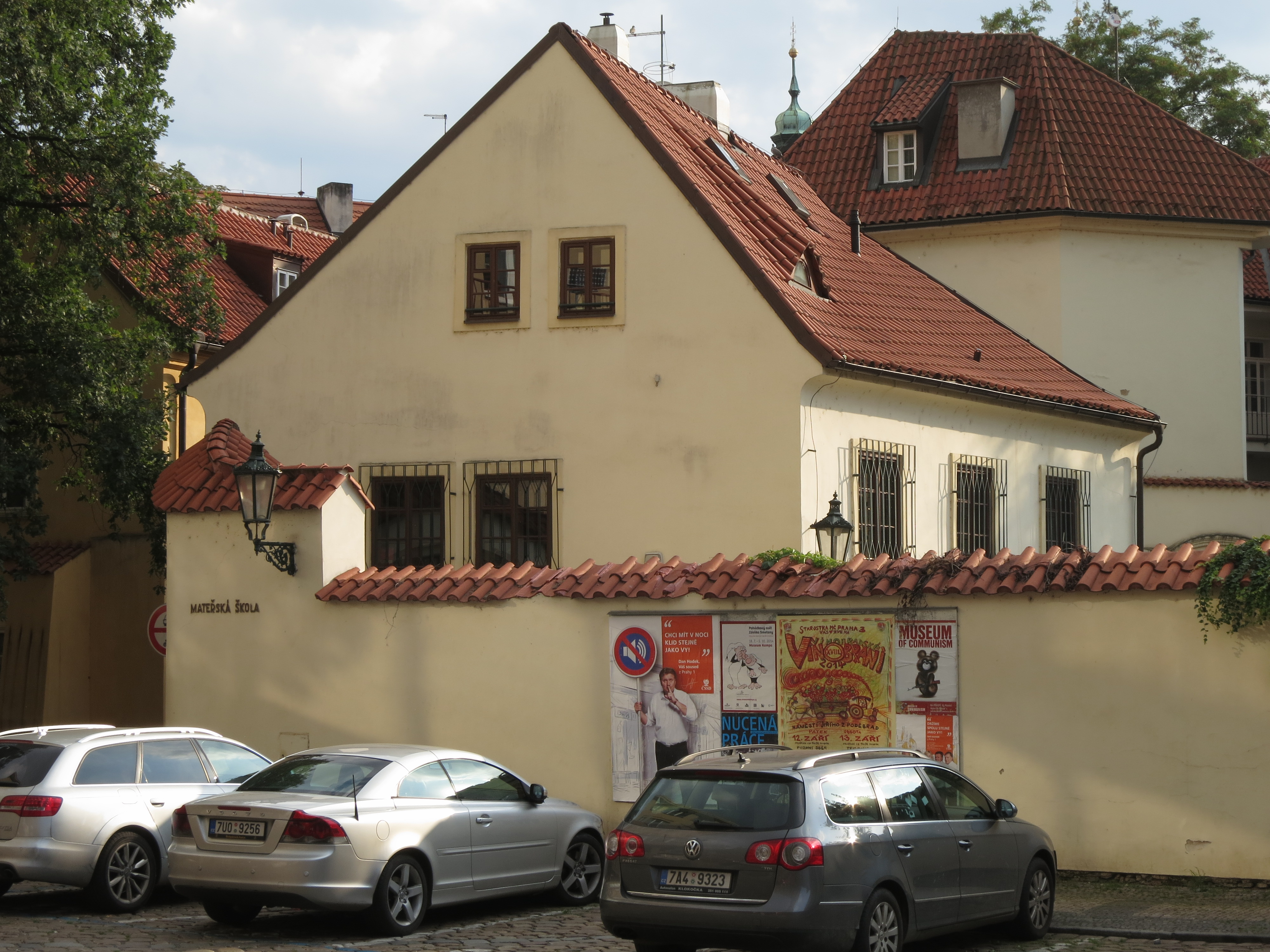 U Roubíčků, Klášterská 779/1, Řásnovka 779/5, Staré Město (Praha).